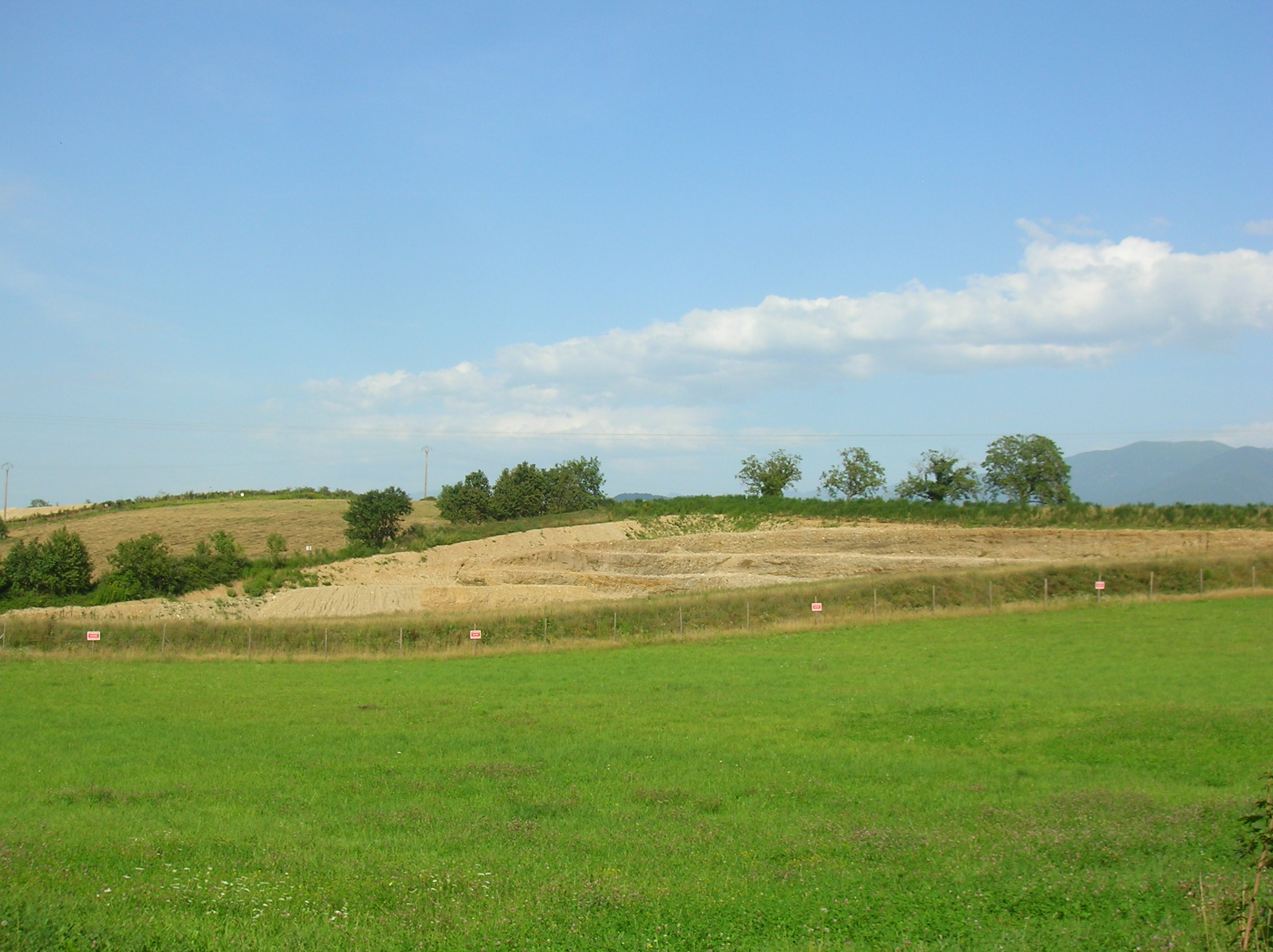 Carrière Vicat sous le fort Barraux. Barraux, Isère, AuRA, France.